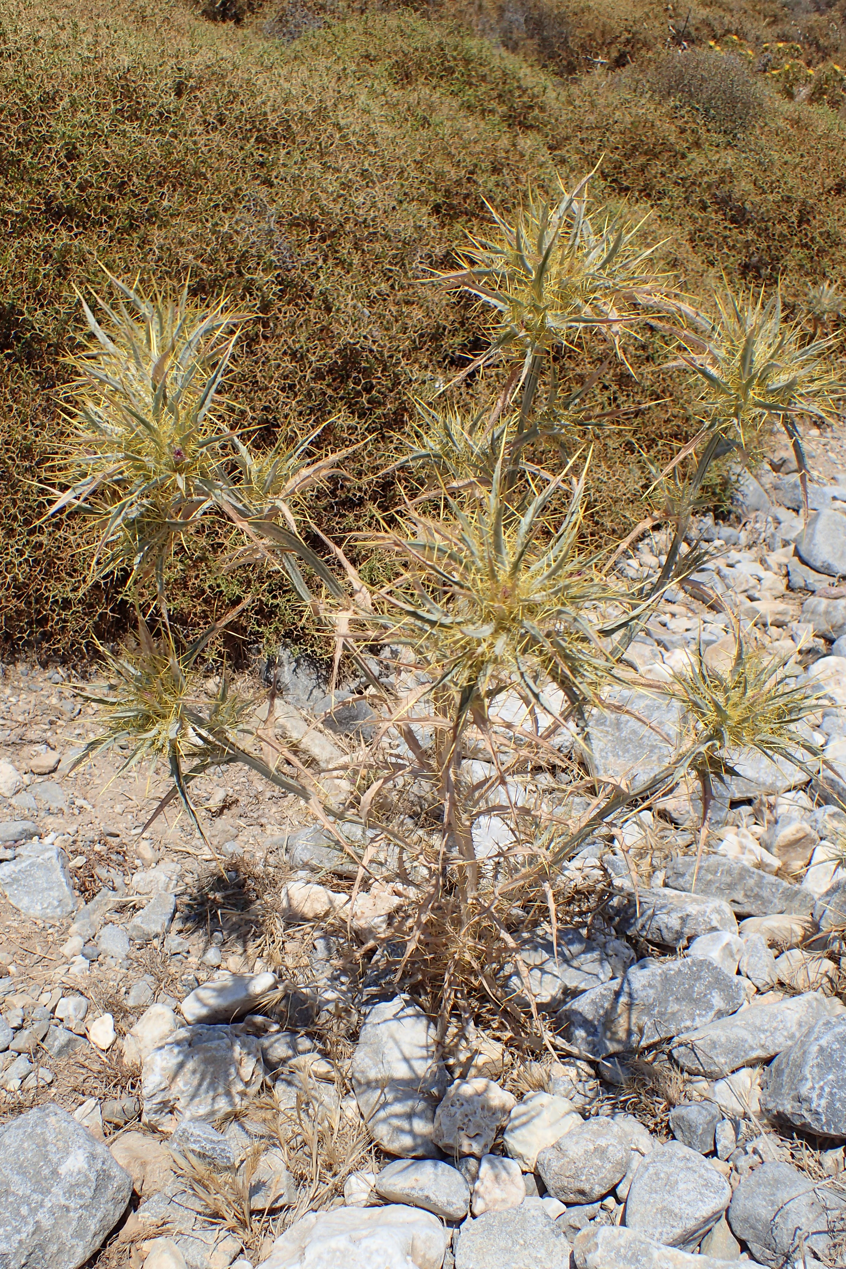 Carthamus dentatus ssp. ruber in Impros, Crete, Greece